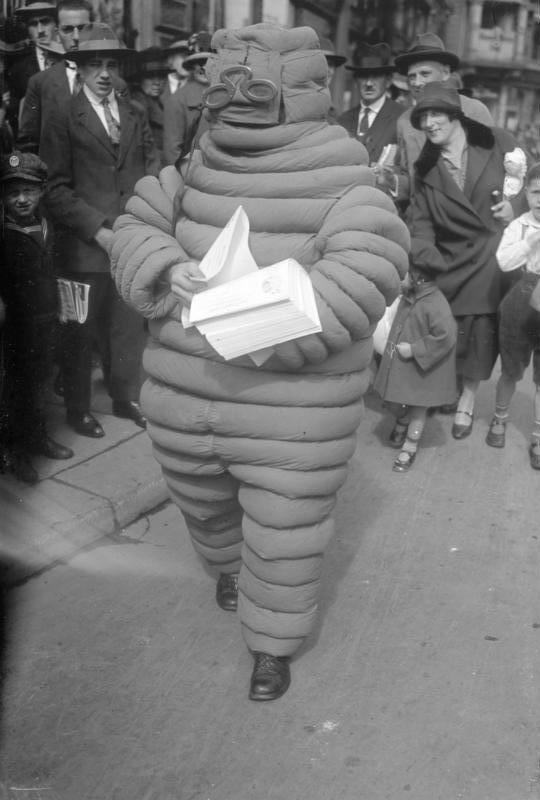 kein Marsmensch, sondern?... ...eine Reklamefigur in den Strassen Berlins.